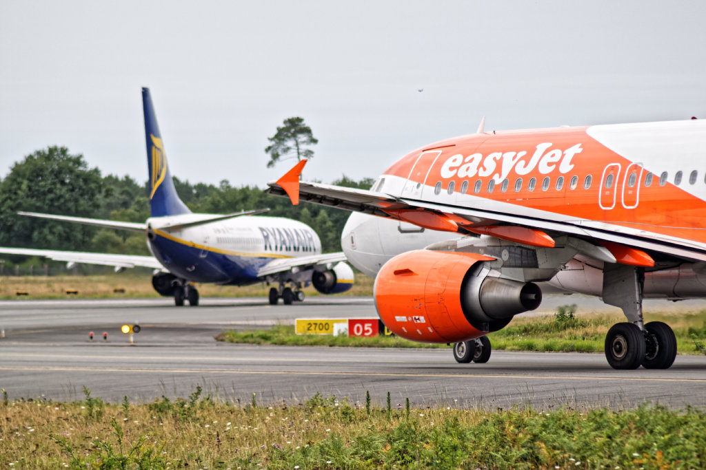 Easy jet : G-EZFE Airbus A319 @ Bordeaux-Mérignac Airport